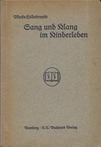 Hanna Mecke-Hildebrandt: Sang und Klang im Kinderleben